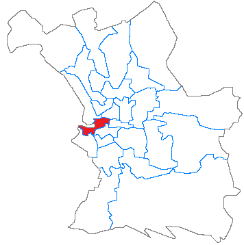 Situation du canton dans la ville de Marseille